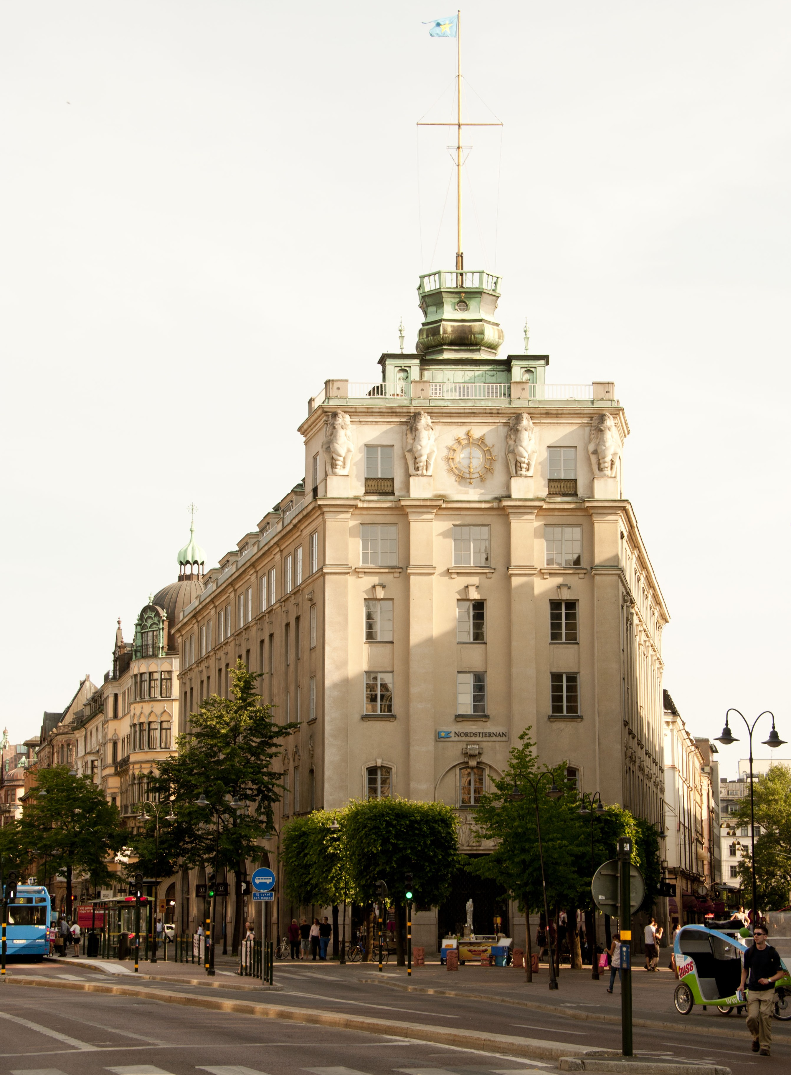 Språkmästaren 5, Stockholm